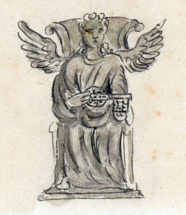 Detail van een tekening van Philippe van Gulpen van vijf zilveren beelden, vóór 1795 in de kerkschat van de Sint-Servaaskerk in Maastricht. Hier: het zilveren beeld van een engel die de (bewaard gebleven) Sleutel van Sint-Servaas droeg. Collectie Van der Noordaa in het RHCL, Maastricht, CVDN 166.